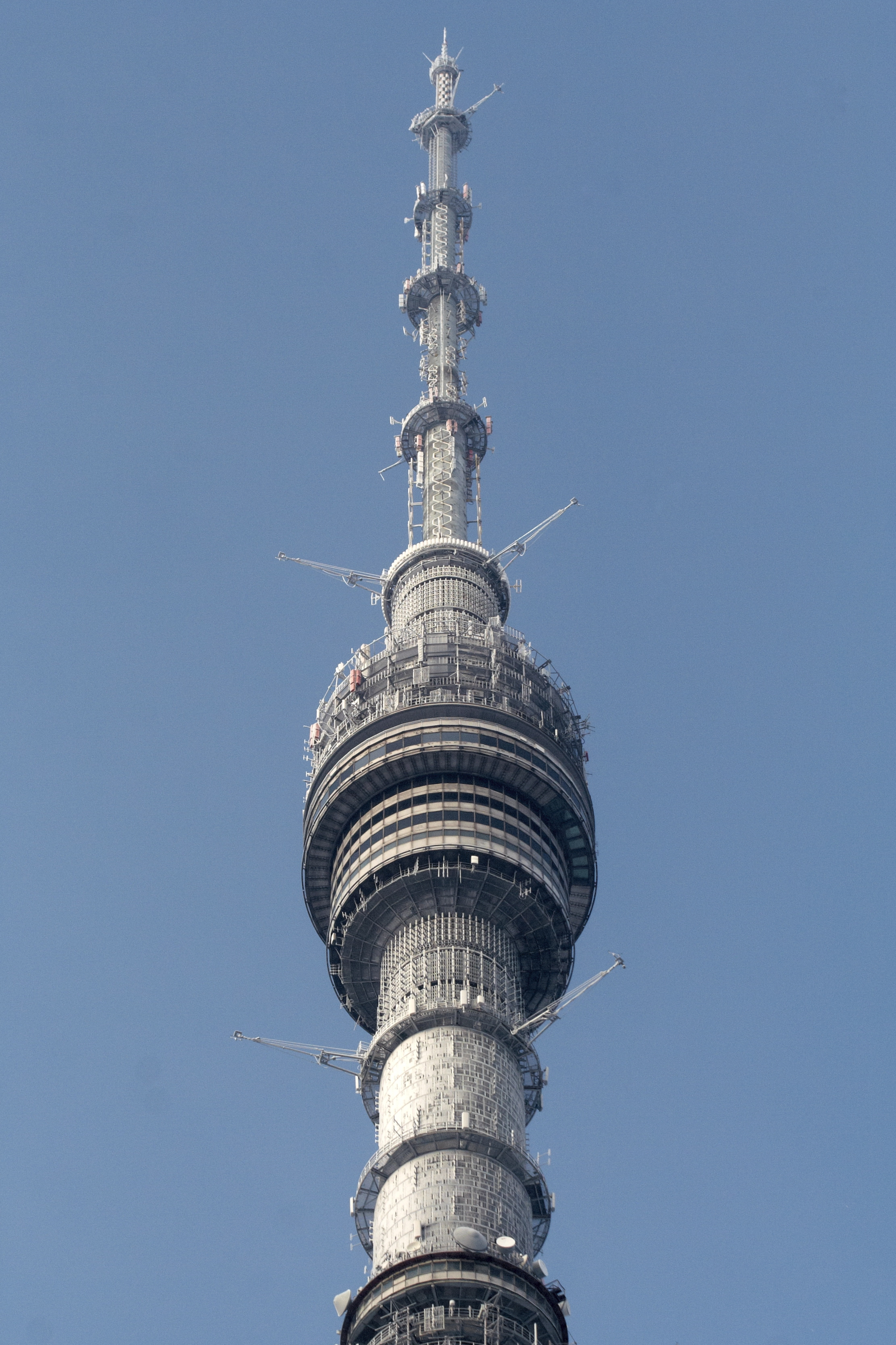 Ostankino TV Tower